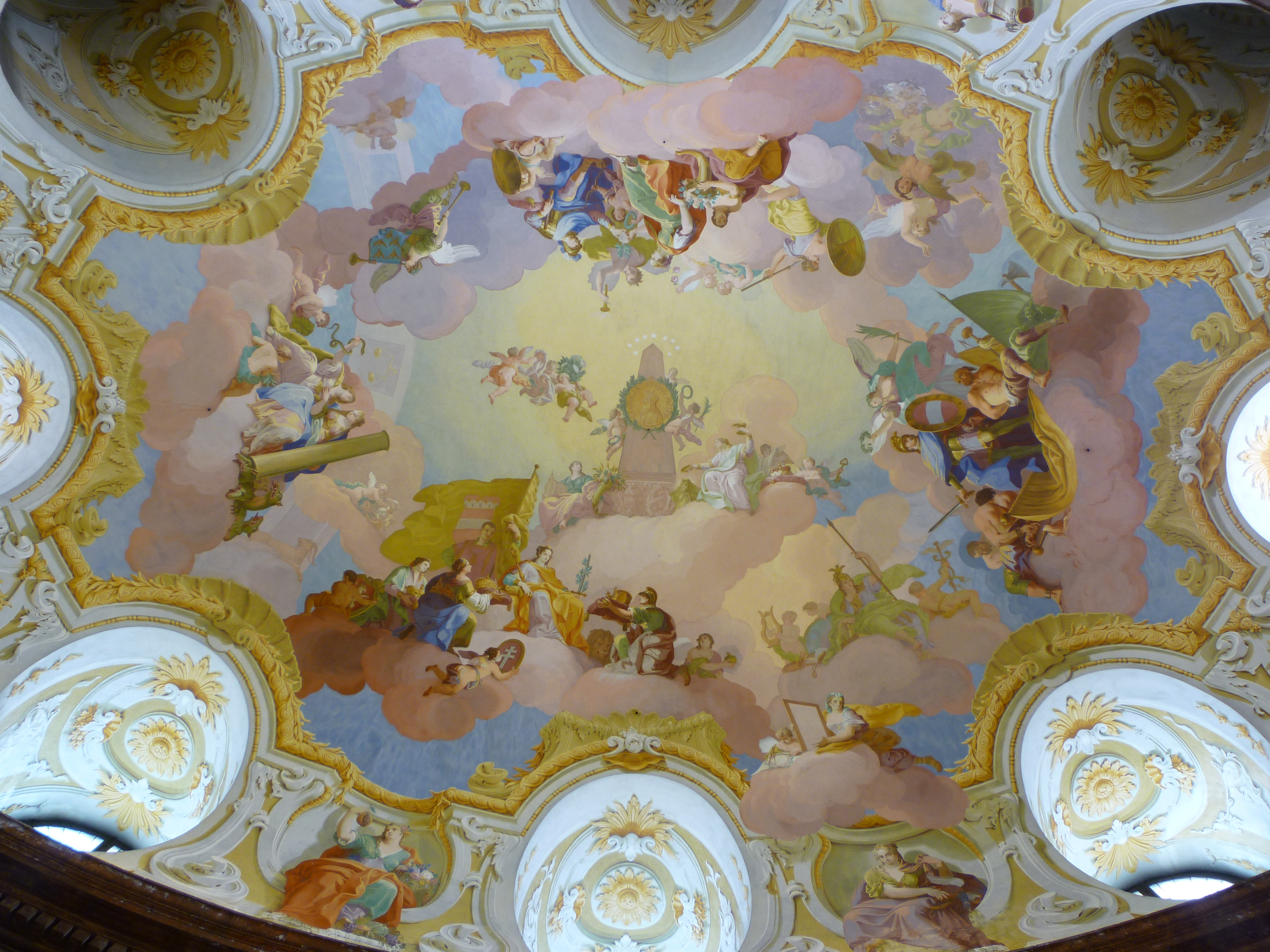 Der vollständige Titel lautet: Ehre, Ruhm und Majestät des Hauses Österreich, im Babenbergischen Stamme angefangen, im Habsburgischen Hause mehr erhöht und im Lotharingischen befestiget.detail